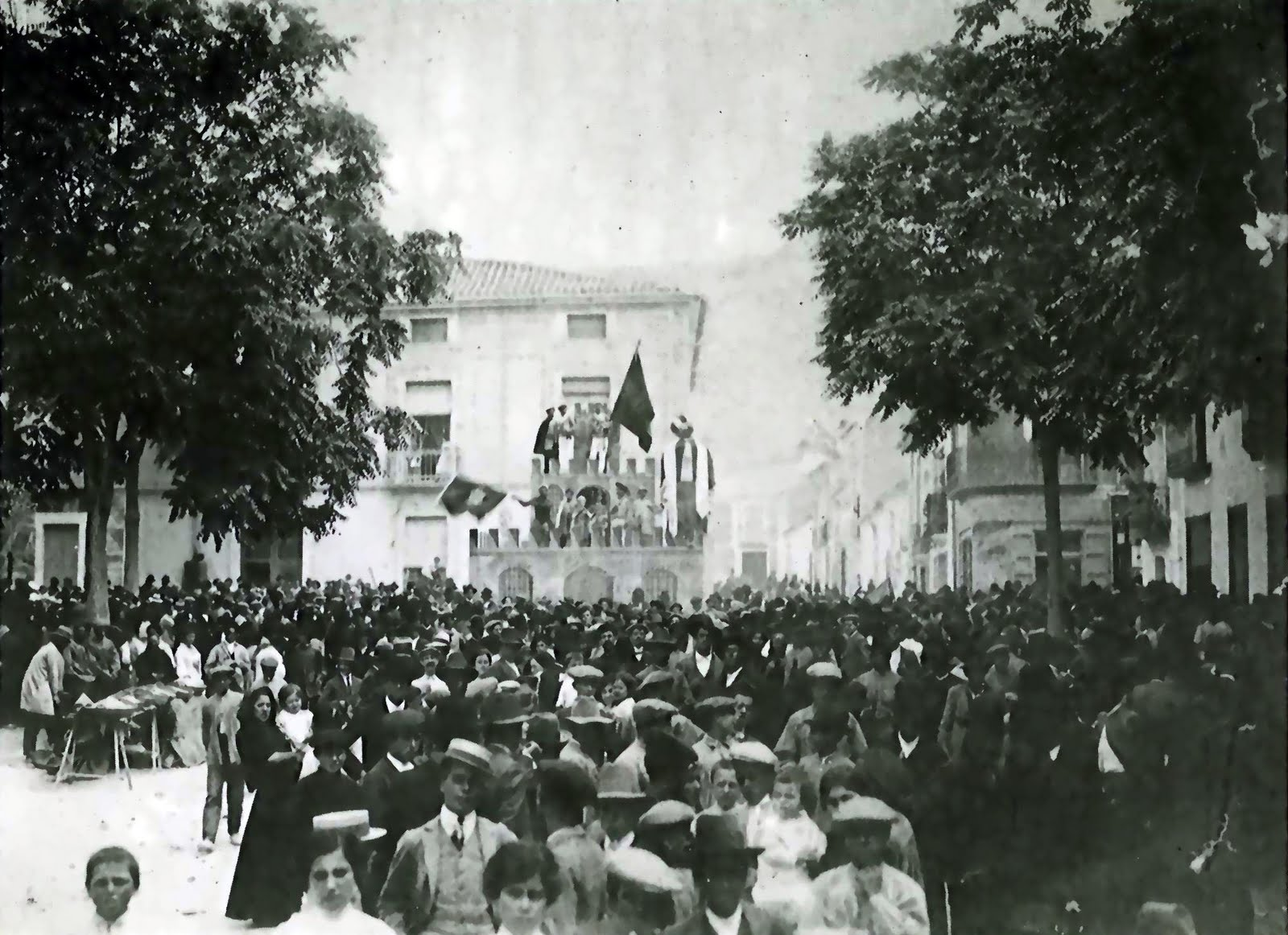 Antiguo castillo de embajadas colocado en la Puerta Almansa, durante las fiestas de Moros y Cristianos.